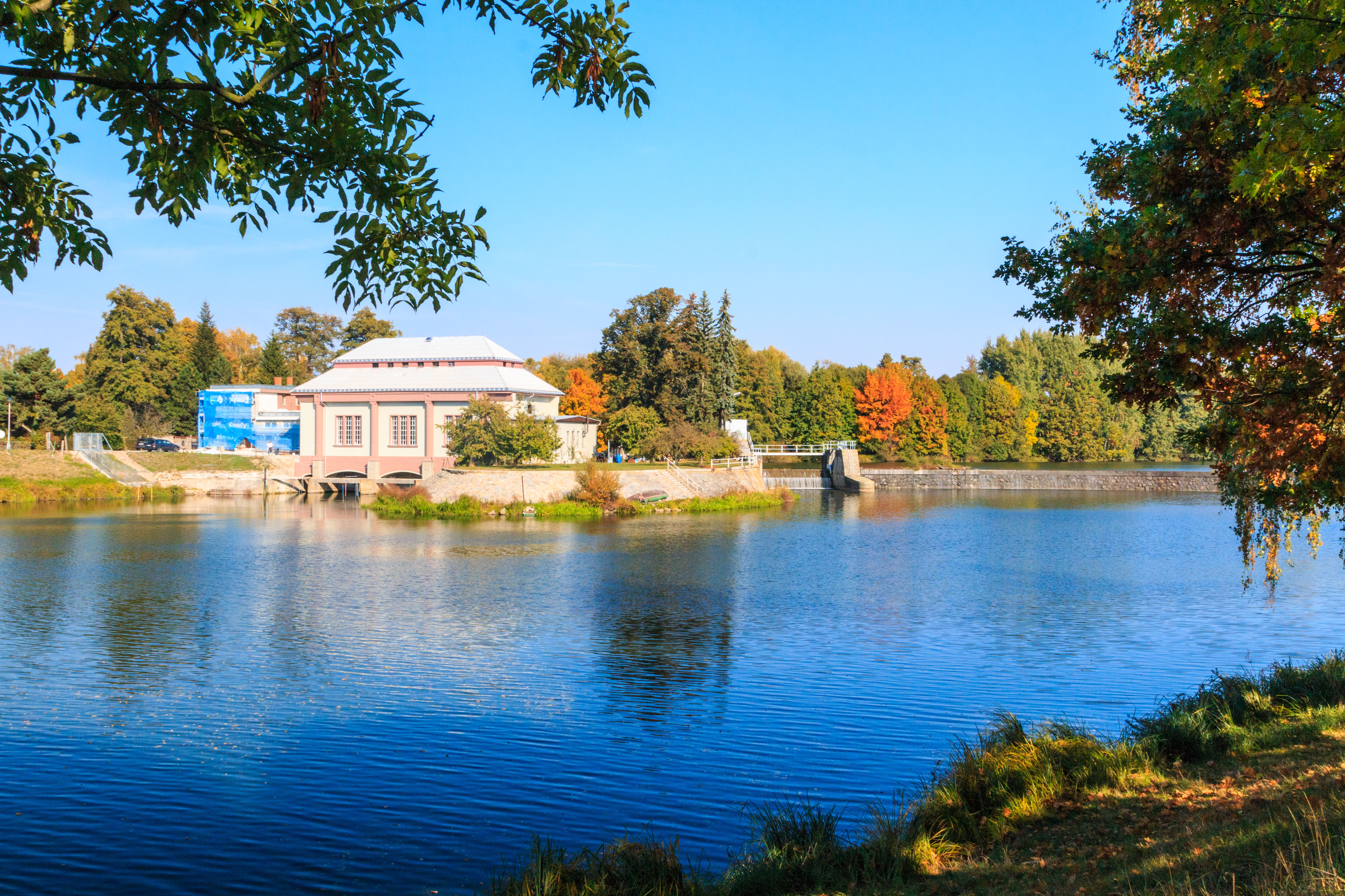 Malšovický jez na Orlici Project: Vodstvo.